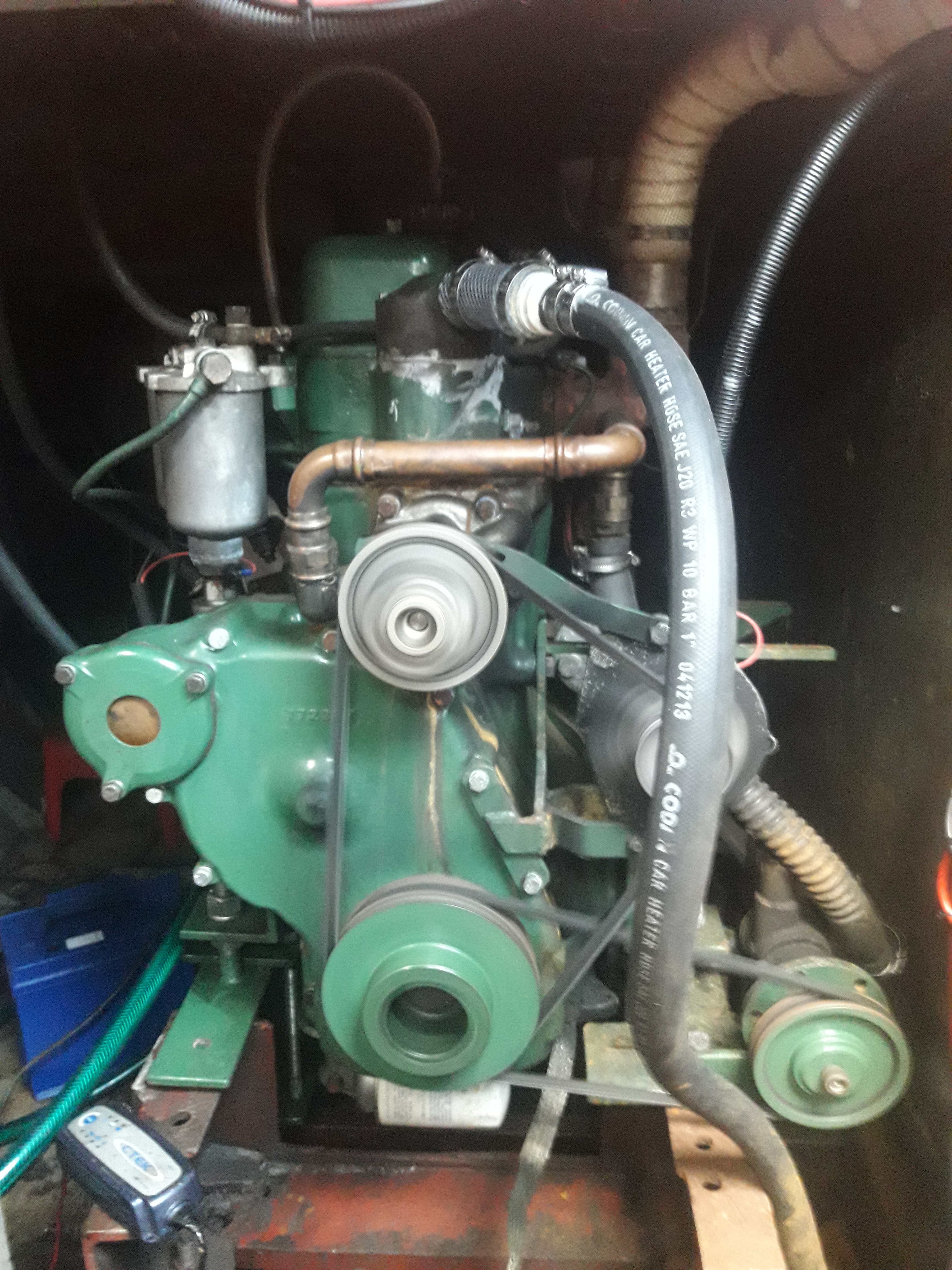 Bolinder-Munktell Diesel traktormotor BM 1113 till fartyget Moälven